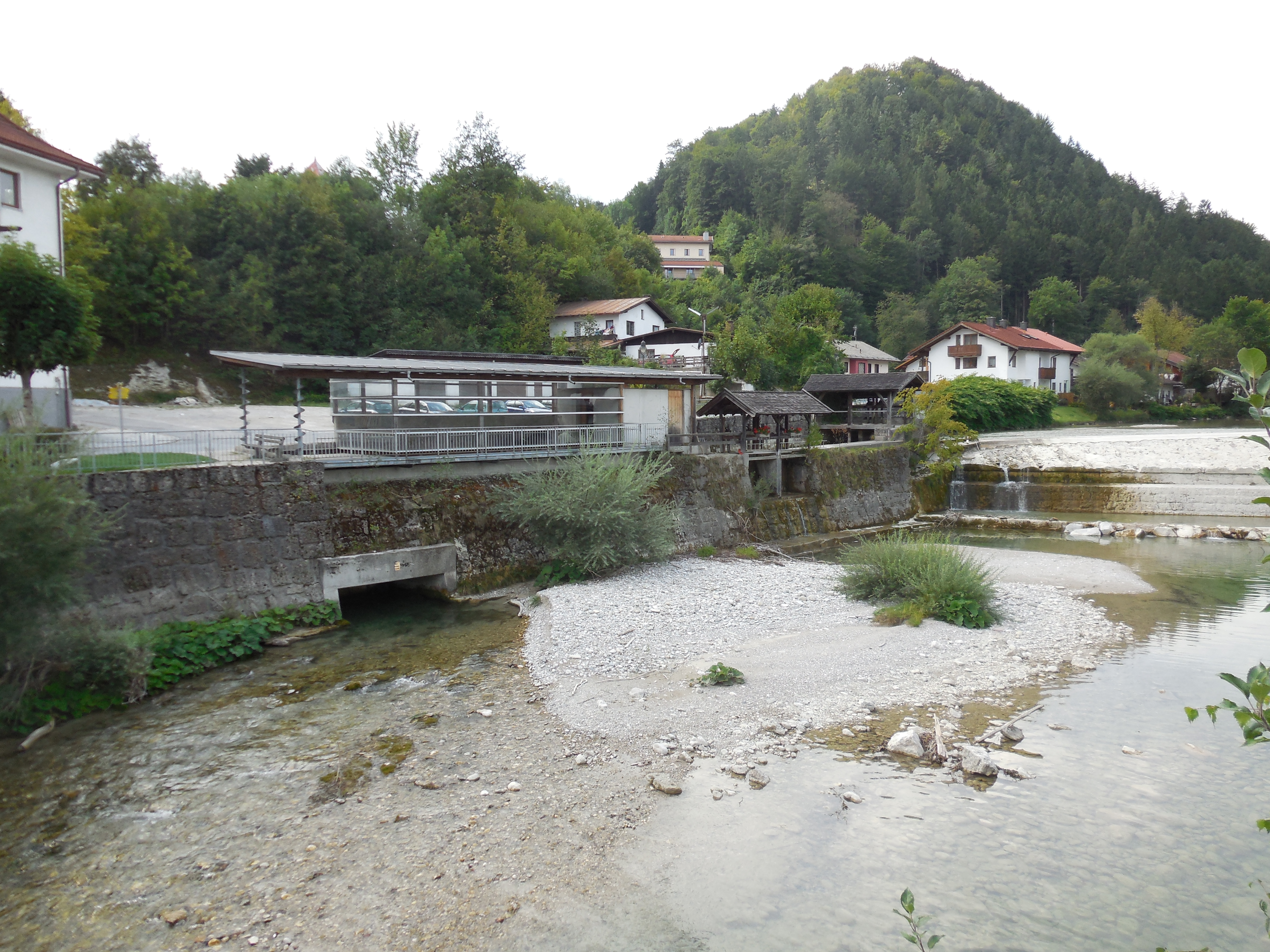 Wasserkraftschnecke am Kieferbach in Kiefersfelden (Mitte rechts: Wehr, Mitte links: Kraftwerksgebäude)